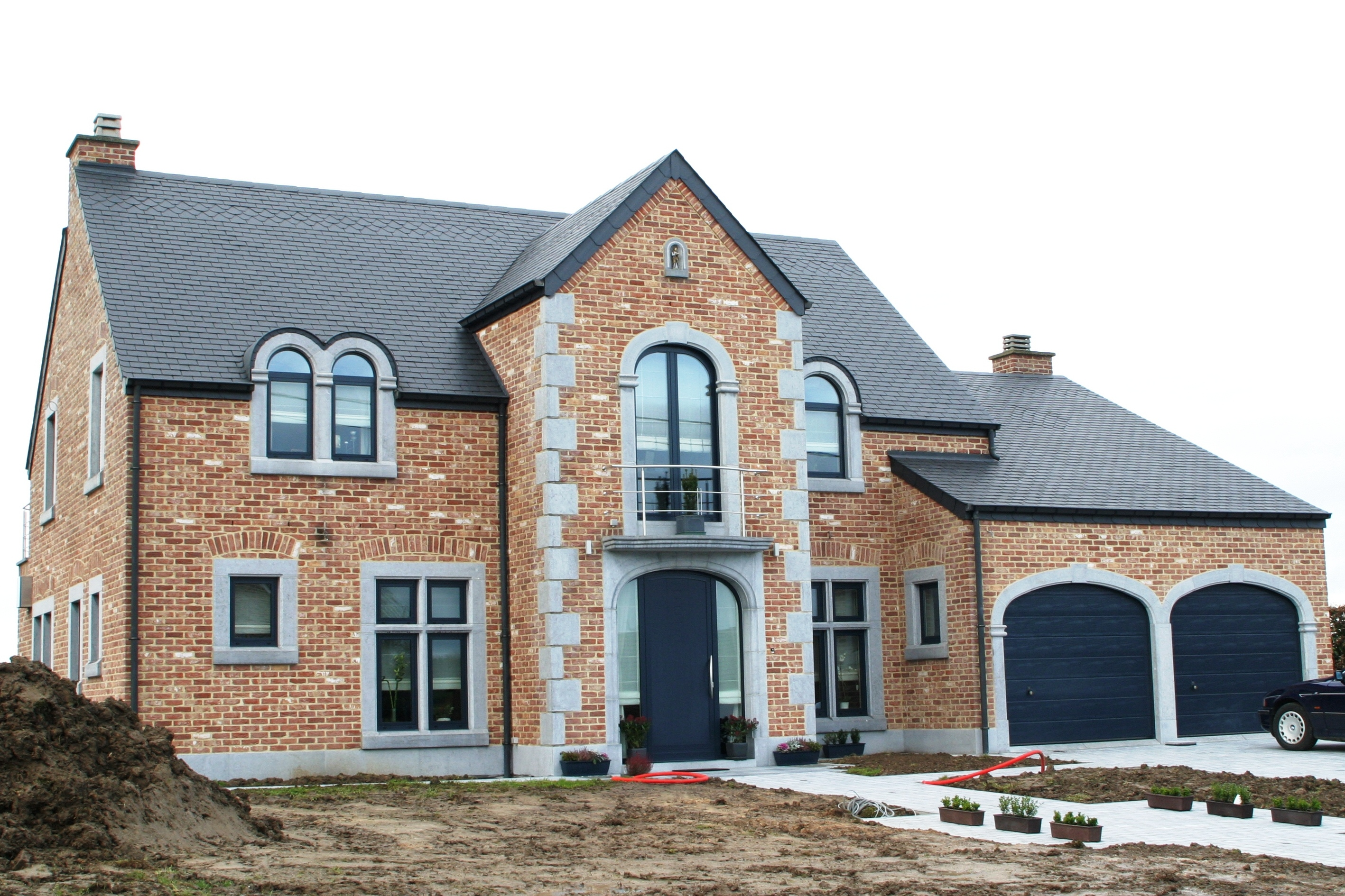 Fassadegiewel mat Balcon. Kategorie:Haus